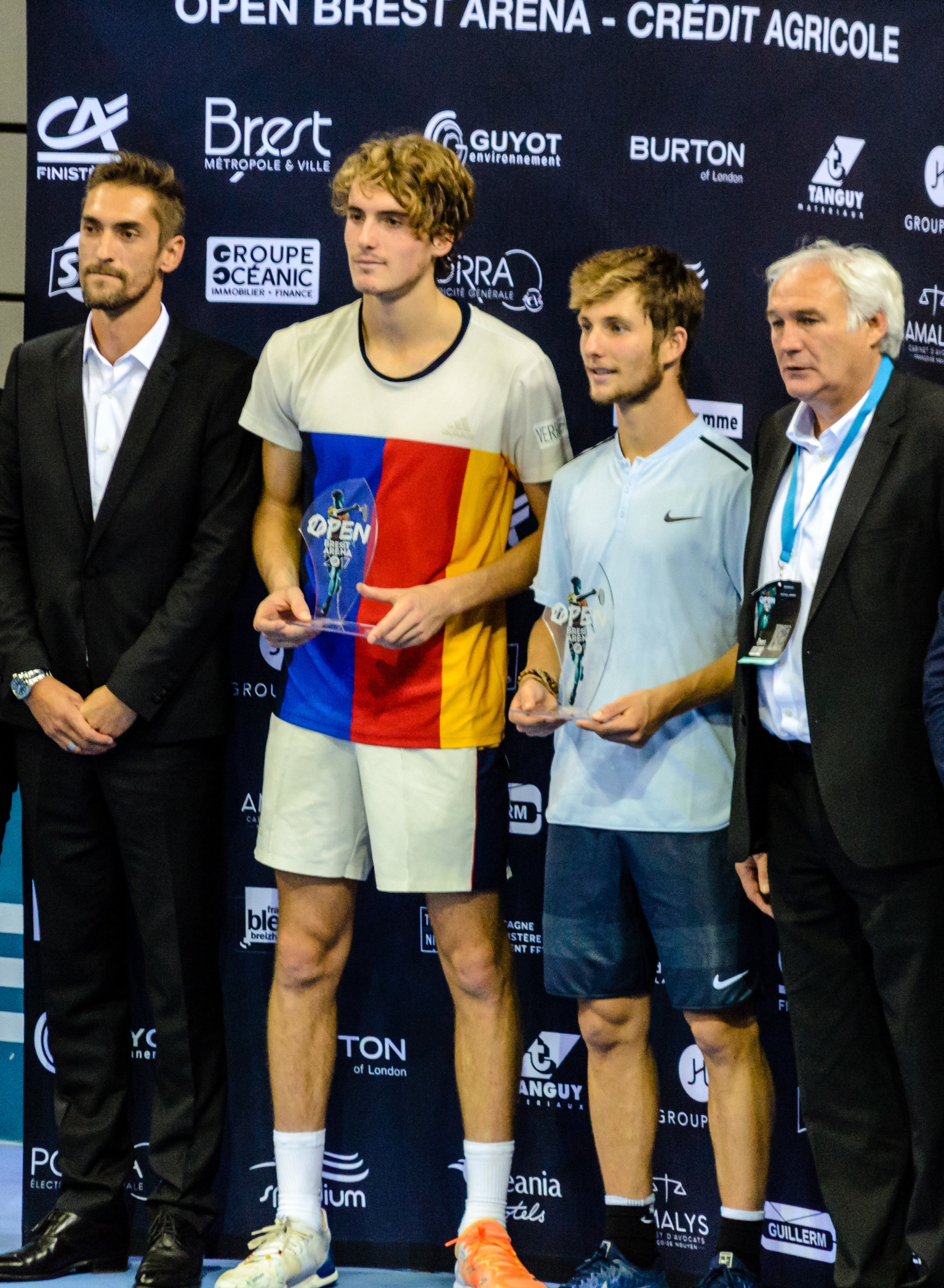 Rencontre entre le Français Corentin Moutet et le Grec Stefanos Tsitsipas en finale de l'Open Brest Arena le 29 octobre 2017. Corentin Moutet a remporté le tournois en deux sets, 6/2 7/6 [8] devant 3 500 spectateurs.